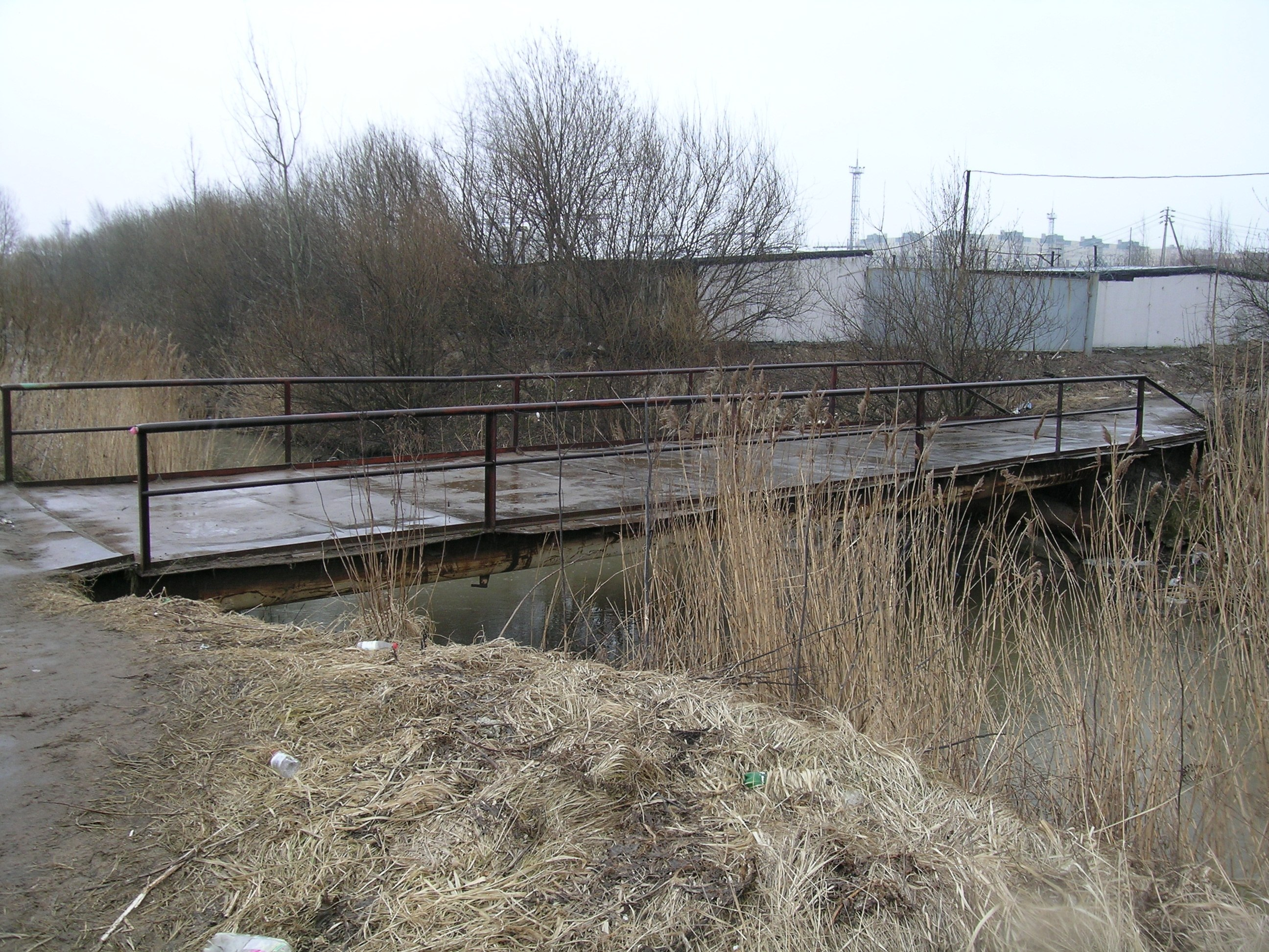 Угольный мост (по офиц. данным ) дорога к Юноне Санкт-Петербург, Угольный мост, литера А Действующий пешеходный, состояние предаварийное Кадастровый номер: 78:0:0078:0:367